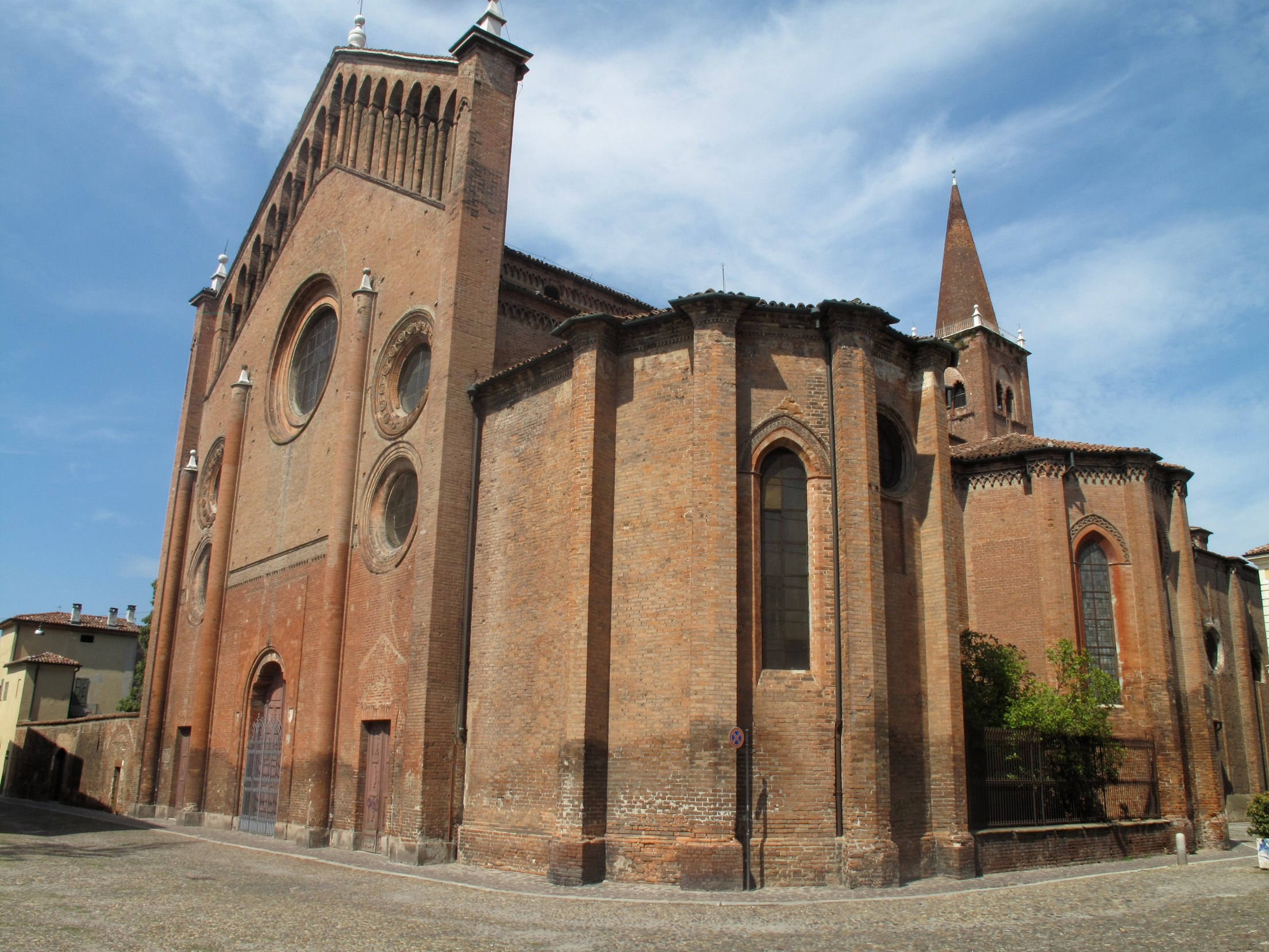 visite juillet 2010